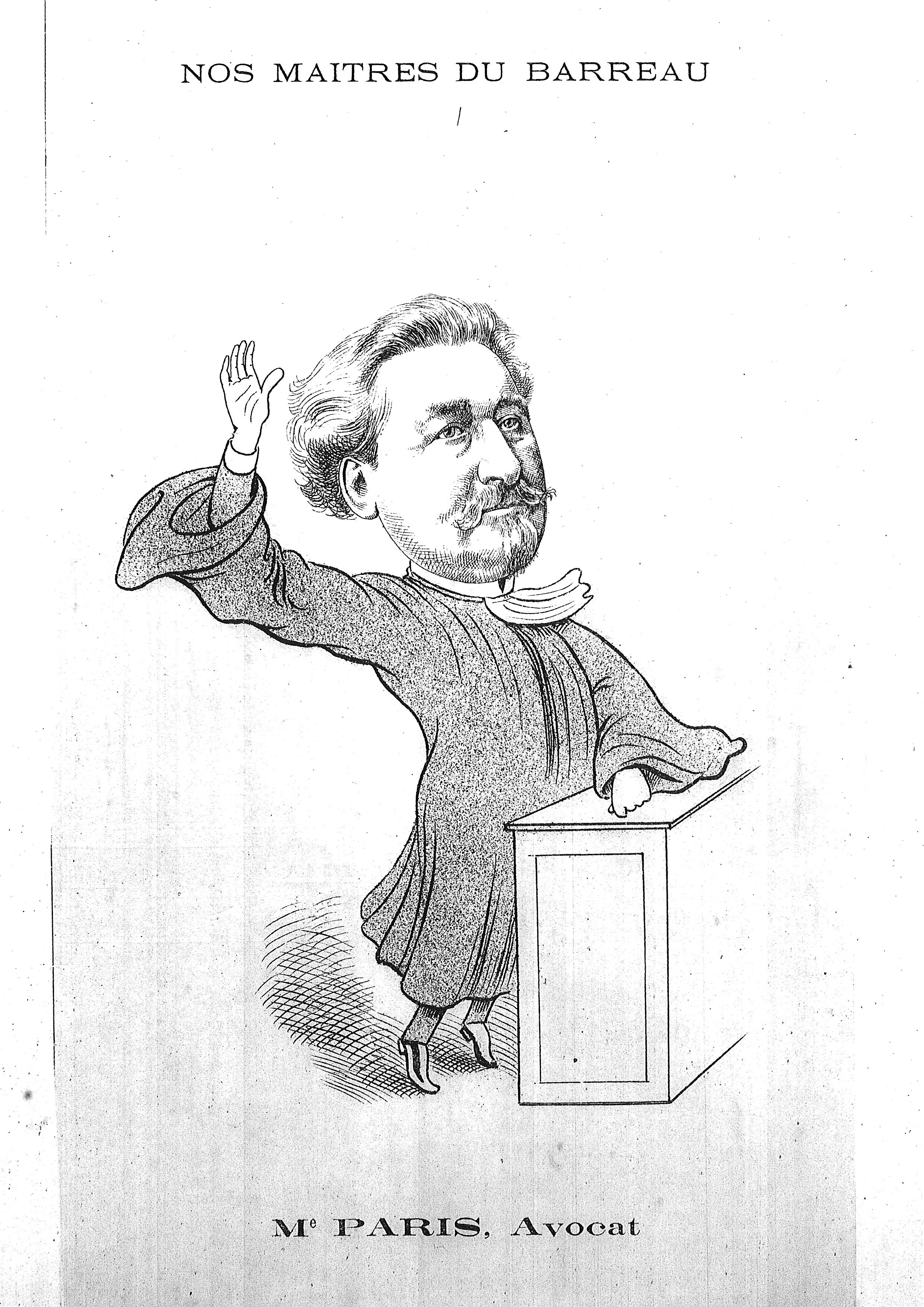 dans le fonds personnalité rémoises de la bibliothèque de reims.